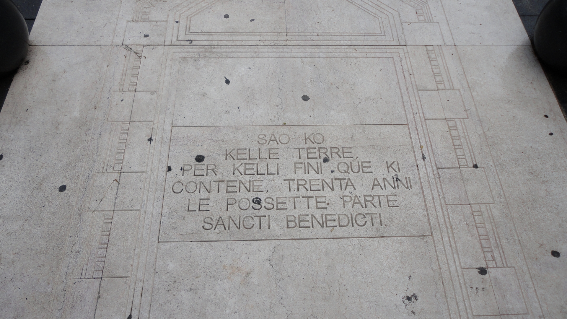 sedicinoni, fonte privata, targhetta posta sullo spiazzale in piazza medaglie d'oro a Capua recante la dicitura del placito il quale sancisce l'inizio del percorso di vita della lingua Italiana.Purtroppo nell'incisione è stato fatto un errore di trscrizione perché il morfema desinenziale di kelle che si trova accanto a fini è stato accordato con quest'ultimo e reso quindi con kelli, non presente nel testo originale . licenza free